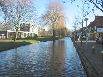 Aar en Aarkade, Alphen aan den Rijn, december 2003, eigen foto